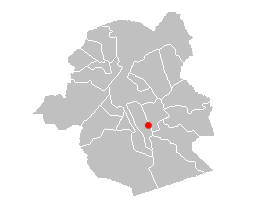 Locatie van de halte (zie bestandsnaam).